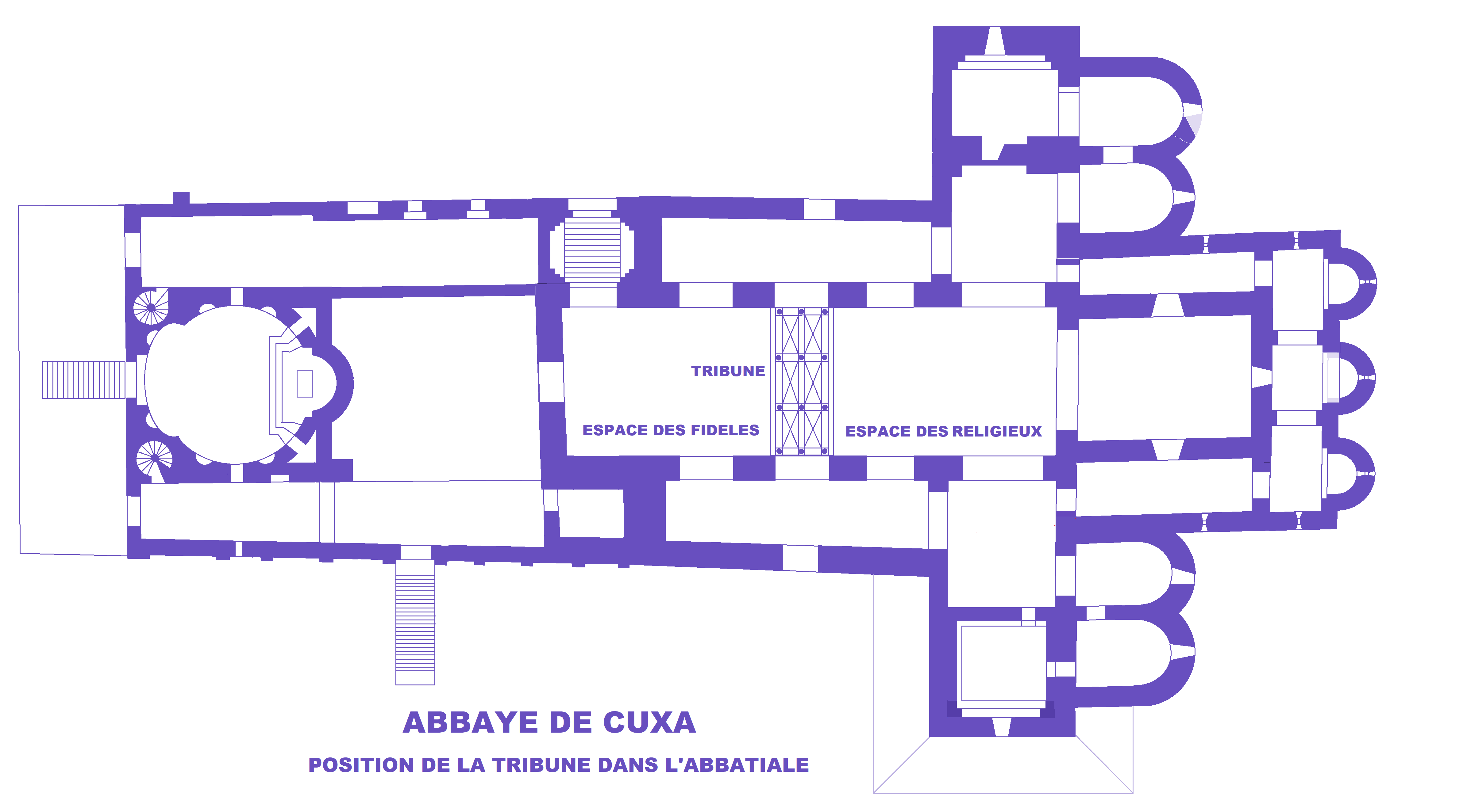 Abbaye Saint-Michel de Cuxa, position possible de la tribune